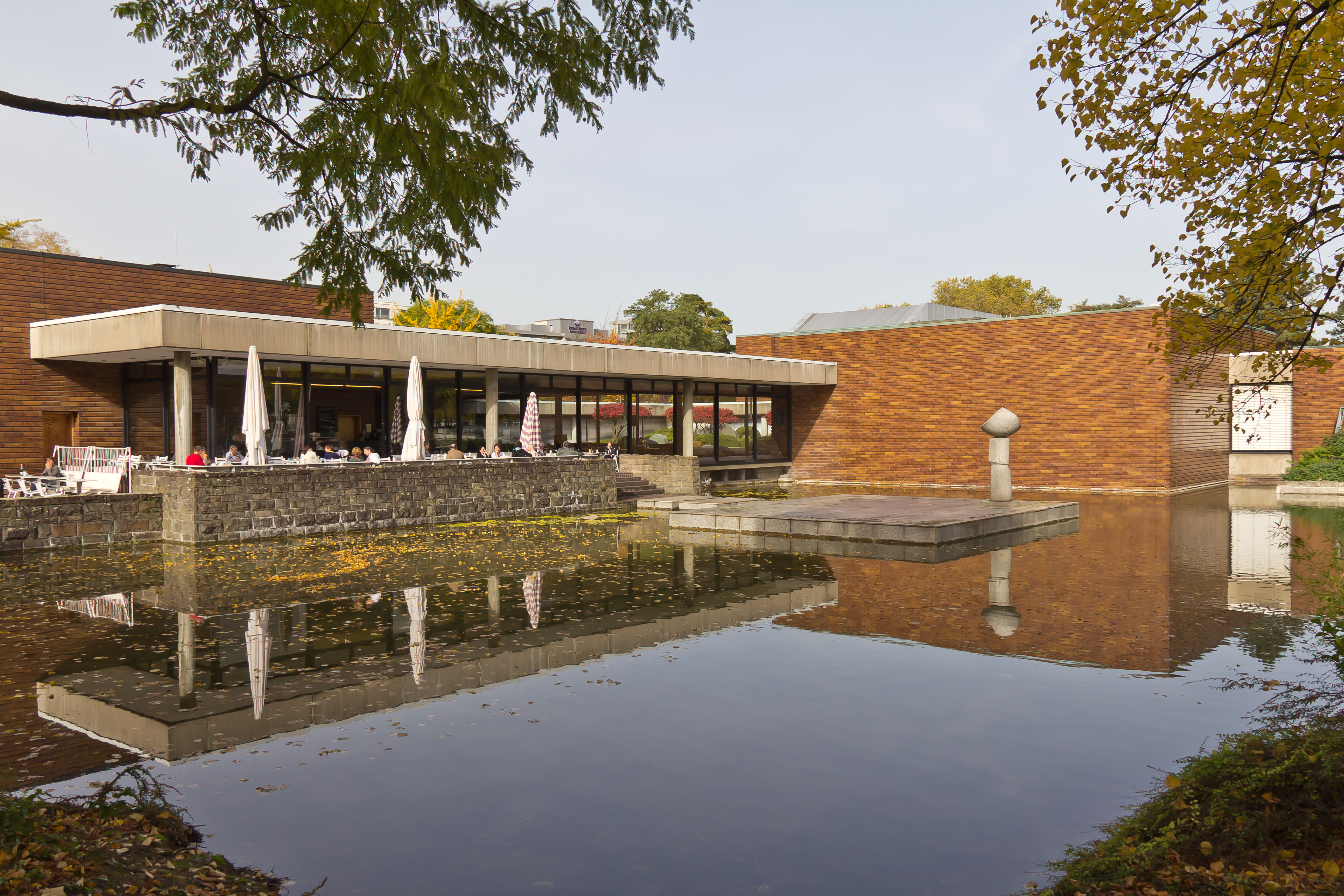 Museum für Ostasiatische Kunst Köln. Ansicht von Südosten mit dem Aachener Weiher und der Plastik „Fahne im Wind“ von Masayuki Nagare